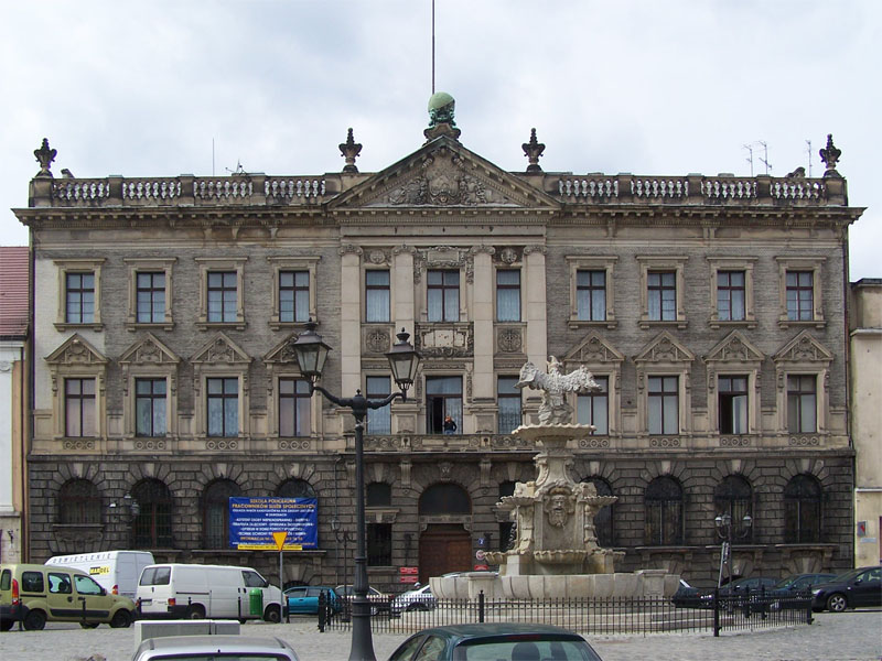 Szczecin Plac Orła Białego 2 - Pałac pod Globusem, 1723